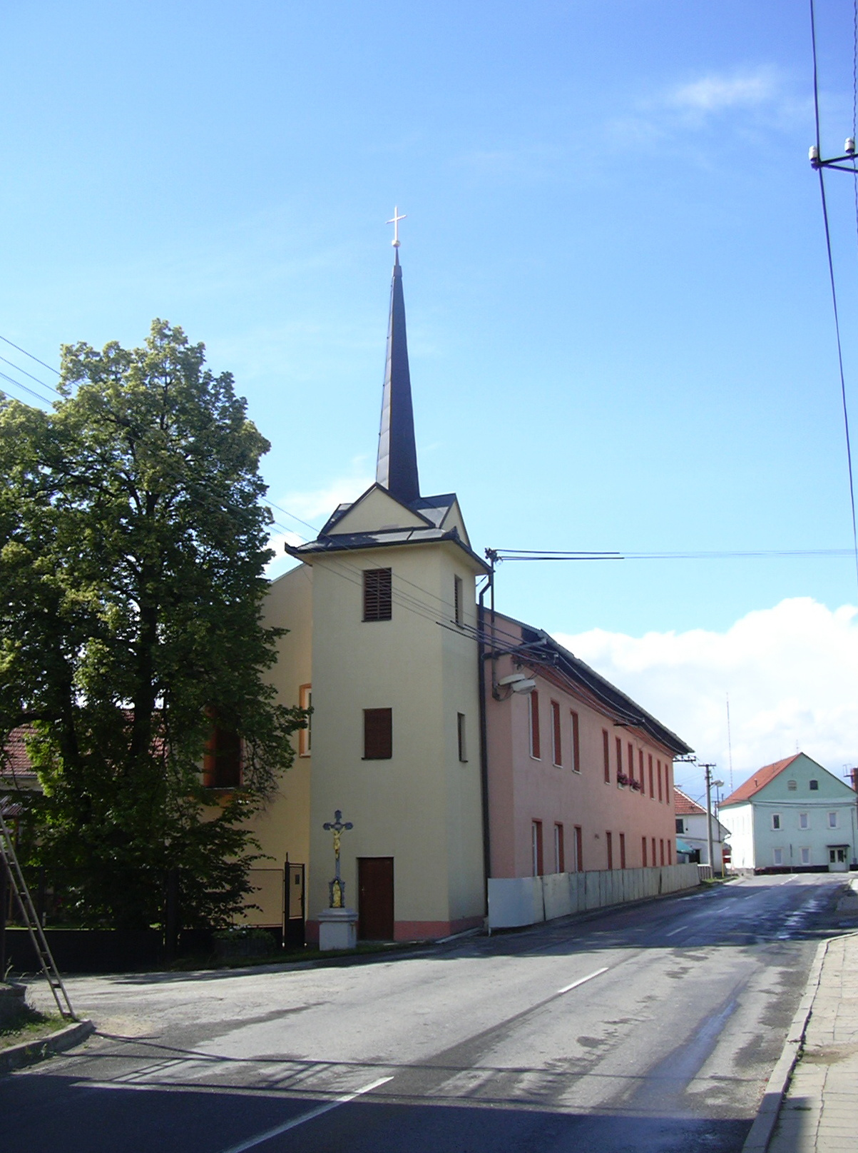 Zvonice v obci Podomí v okrese Vyškov